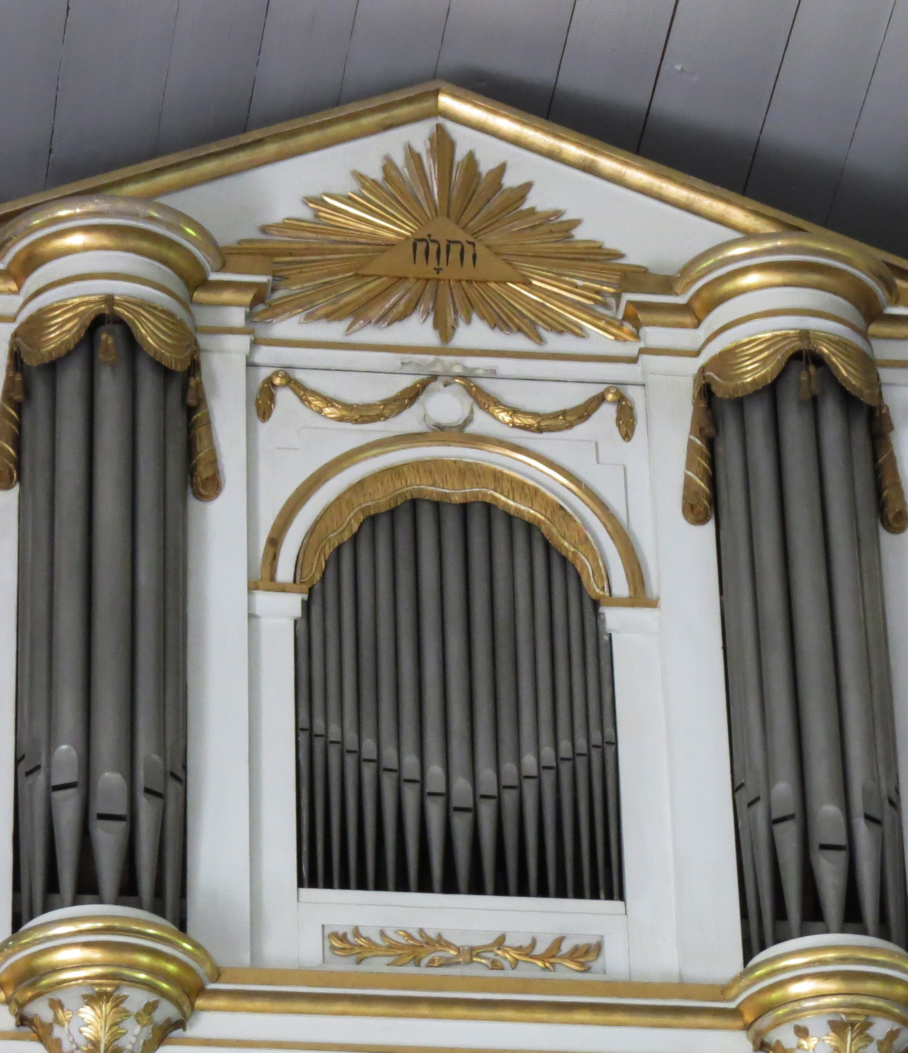 Orgel från 1815 i Rappestad kyrka